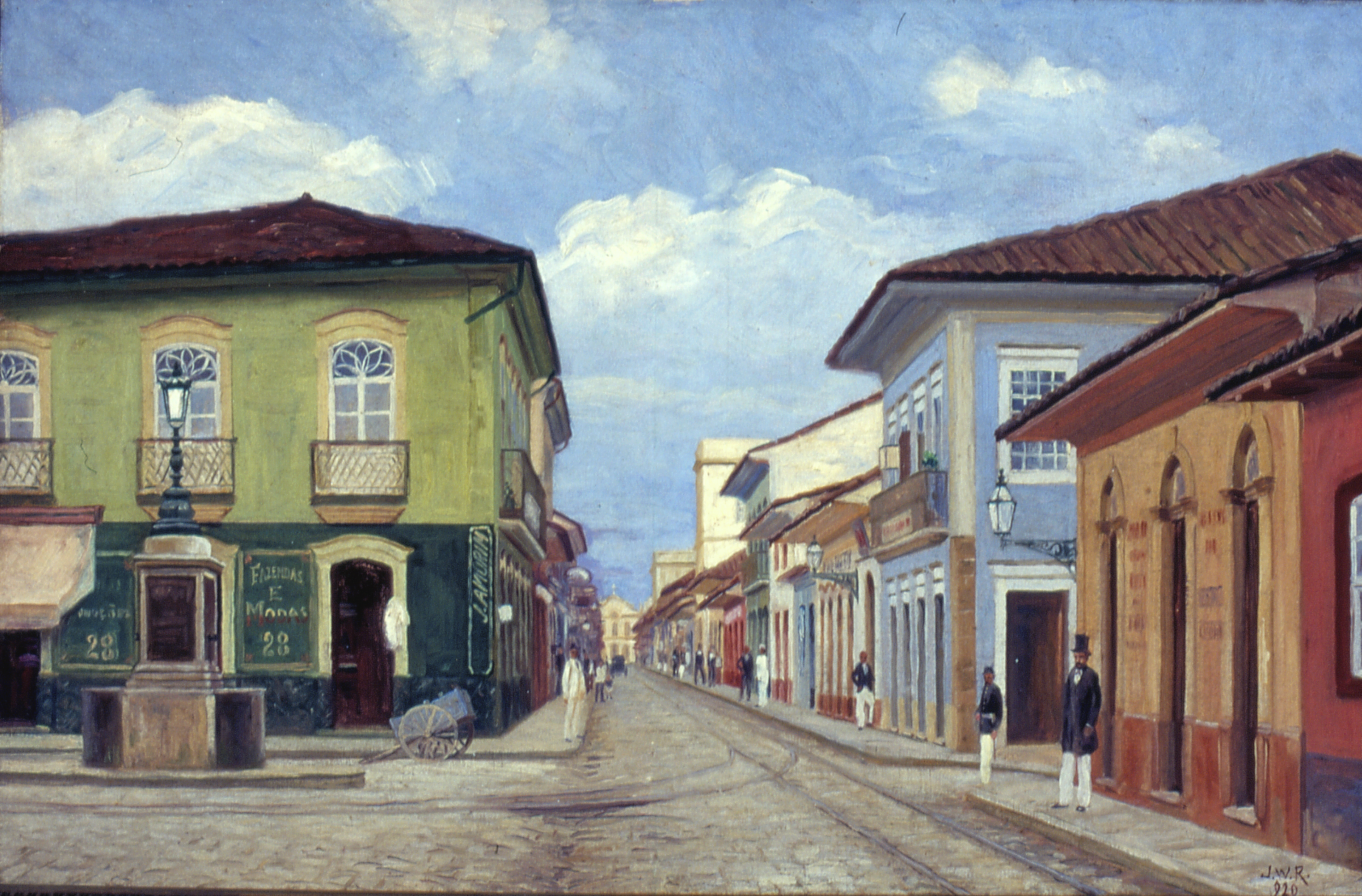 Obra que integra o acervo do Museu Paulista da USP. Coleção José Wasth Rodrigues - CJWR